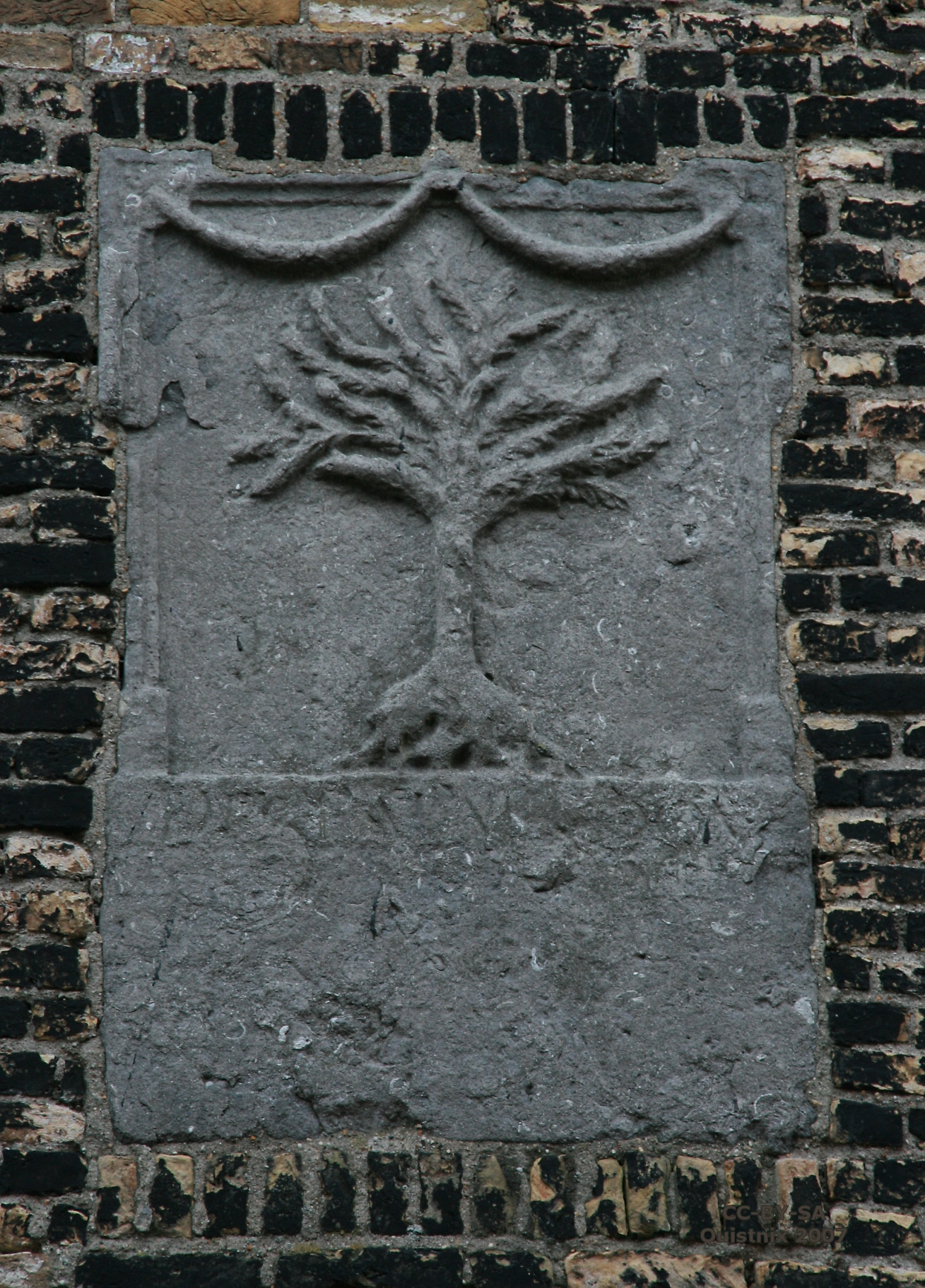 Schiedam: gevelsteen in molen De Nieuwe Palmboom